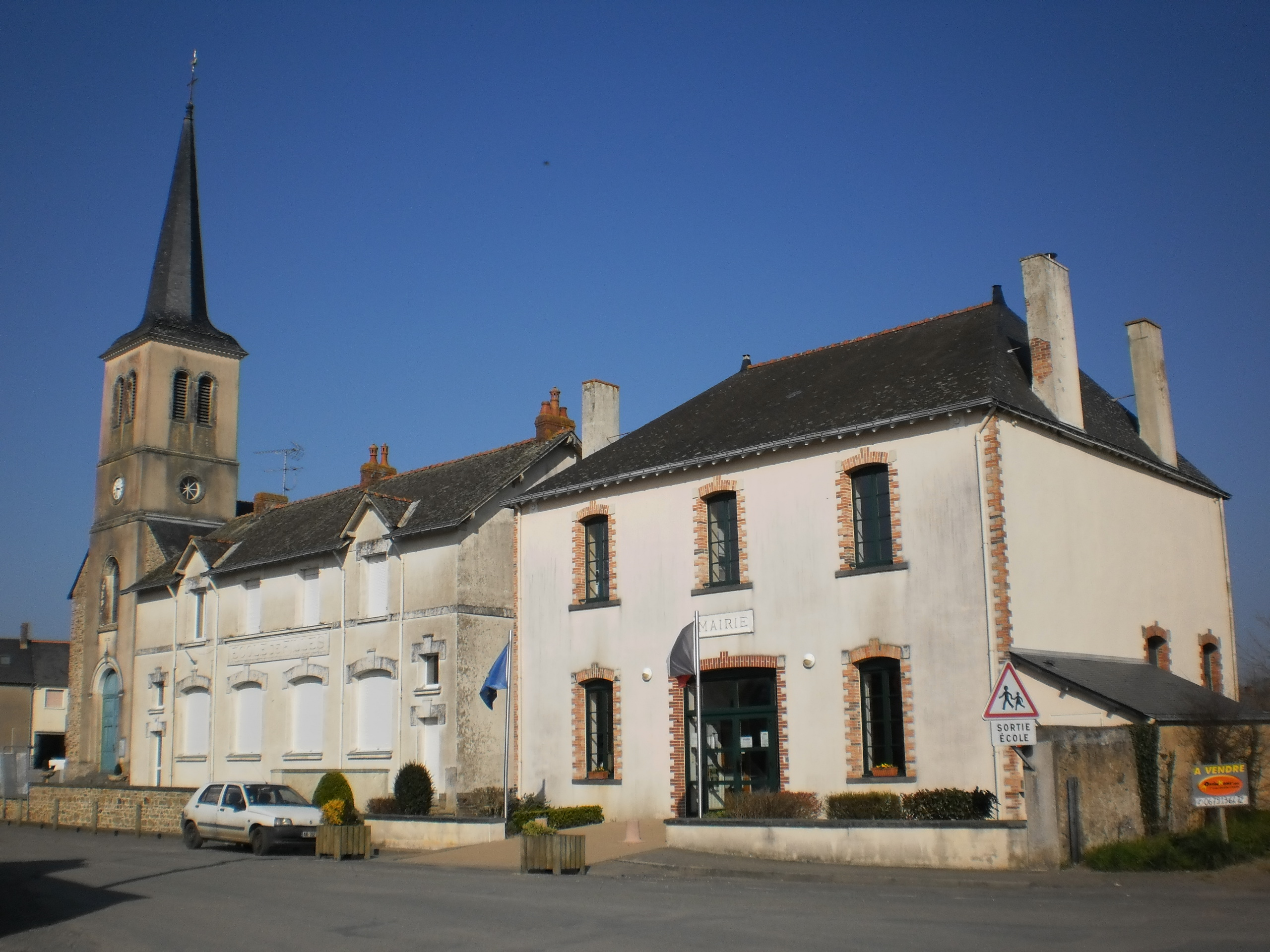 Soulvache (Loire-Atlantique, France) - La mairie, l'école, l'église